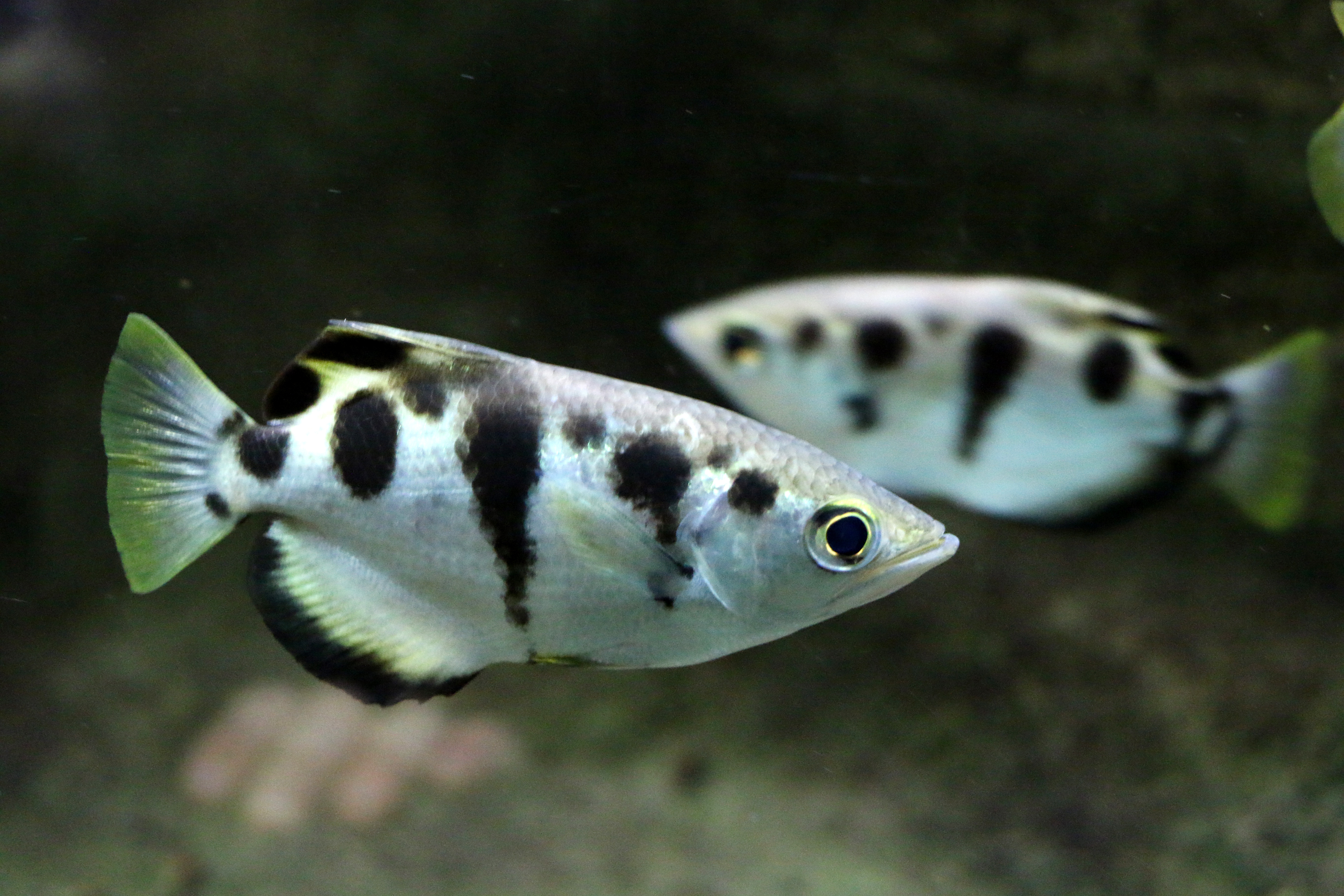 Poisson-archer Toxotes Jaculatrix à l'aquarium tropical du palais de la Porte-Dorée